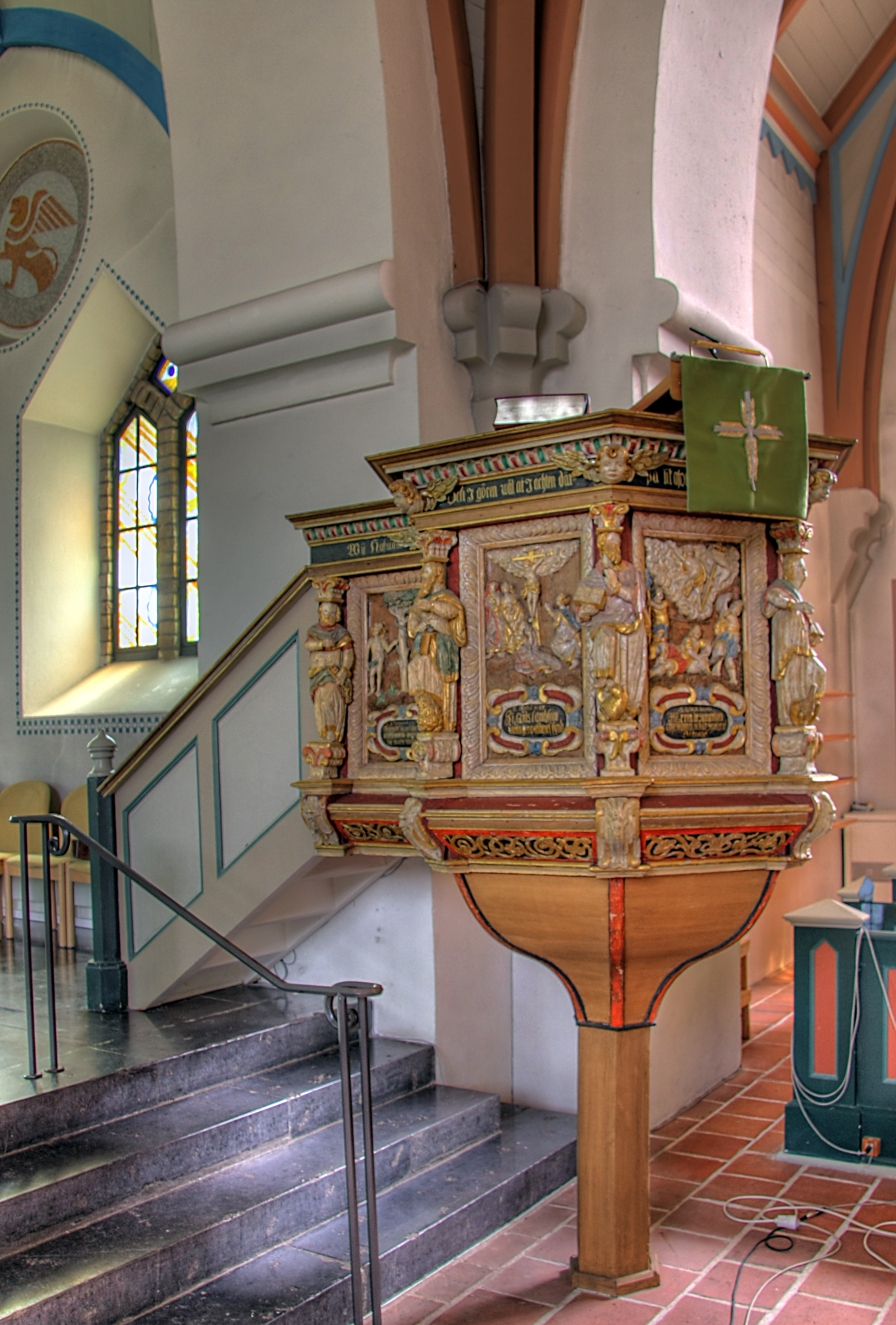 Predikstolen i Västra Vrams kyrka utanför Tollarp i Skåne.